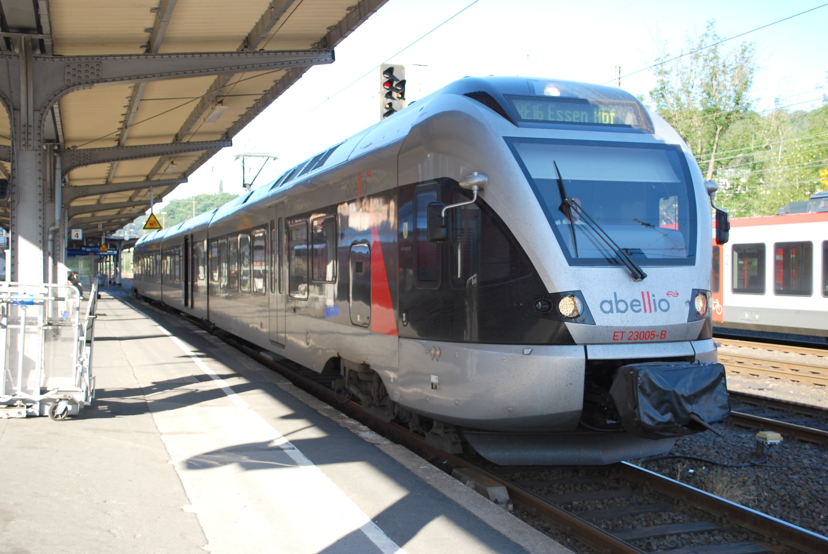 Abellio 15k v ac Alstom LHB "Coradia" (later LINT) 3-car e.m.u. No.ET 23005 at Siegen on an Essen service, 6/11.